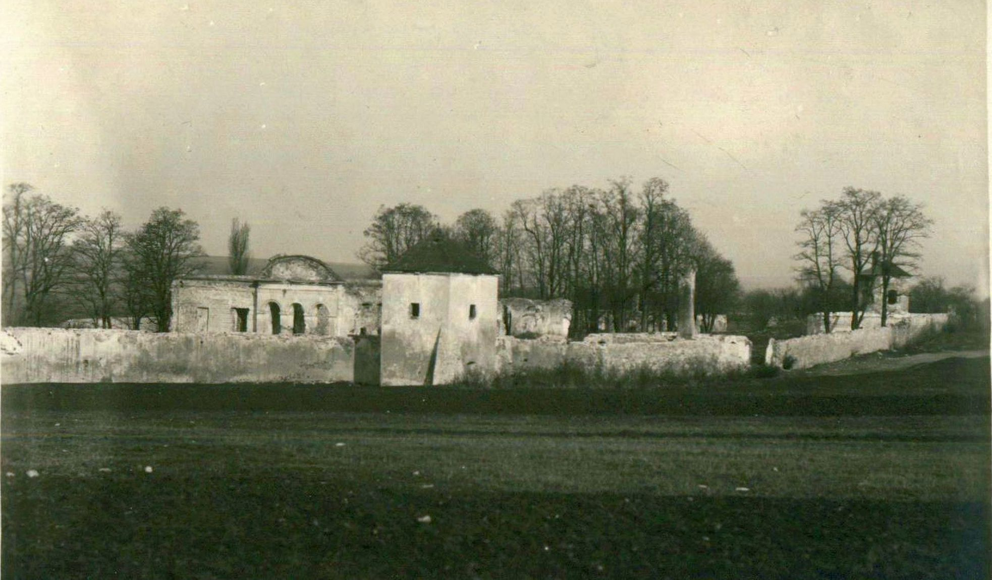 Sobków. Fortalicja Stanisława Sobka z Sułowa, 1915